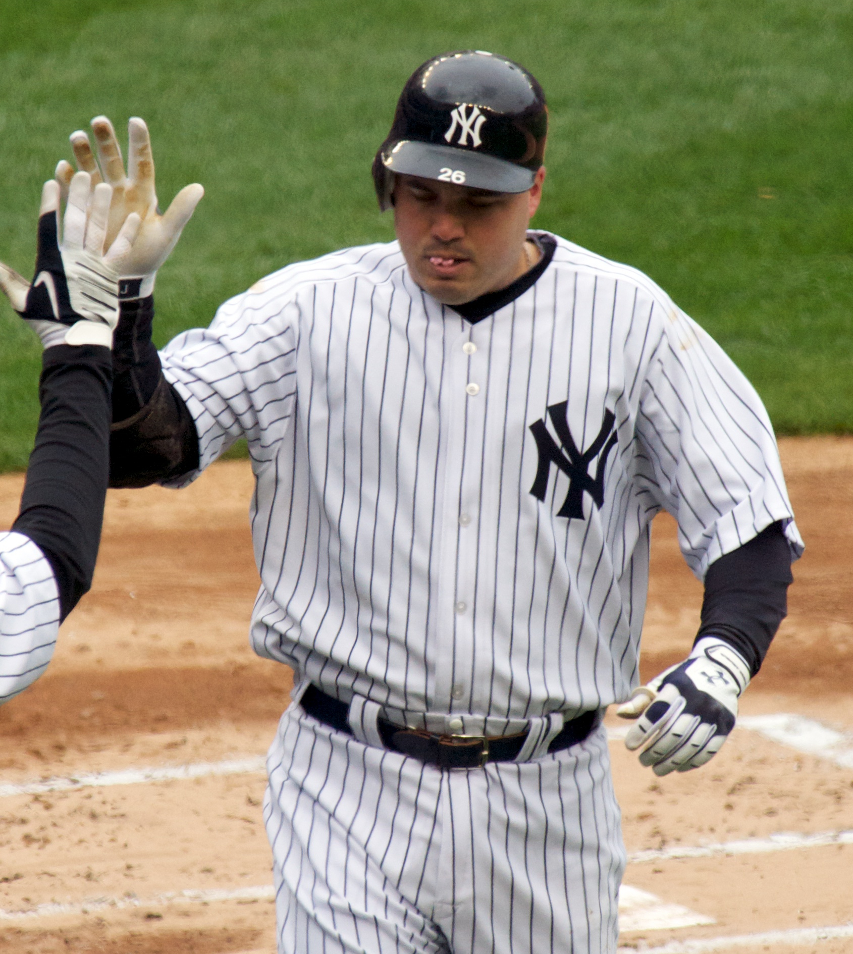 Nick Johnson